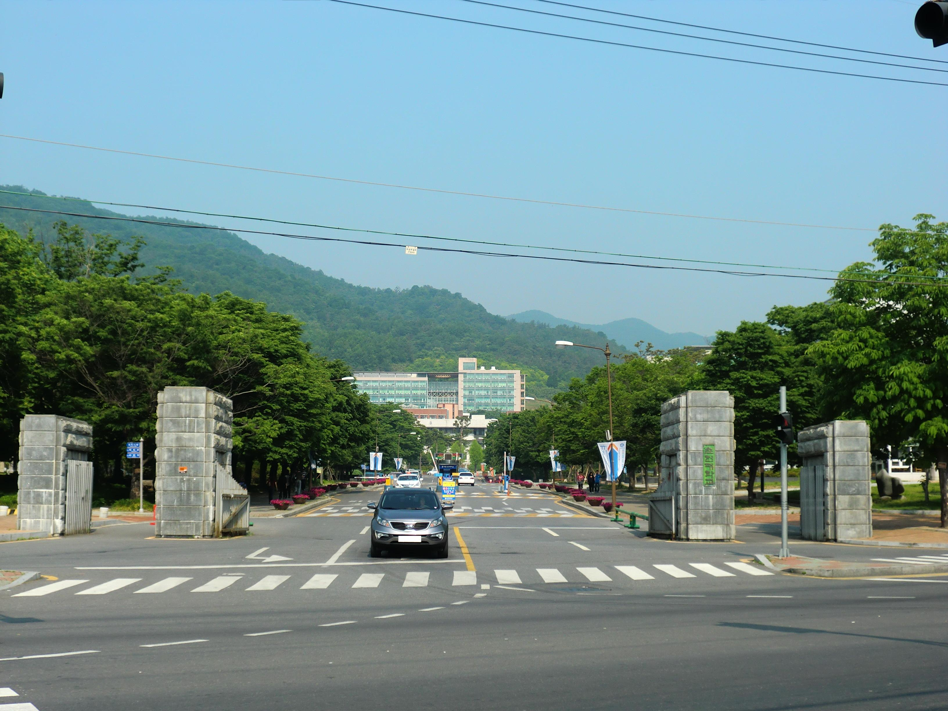 전라남도 순천시에 있는 순천대학교